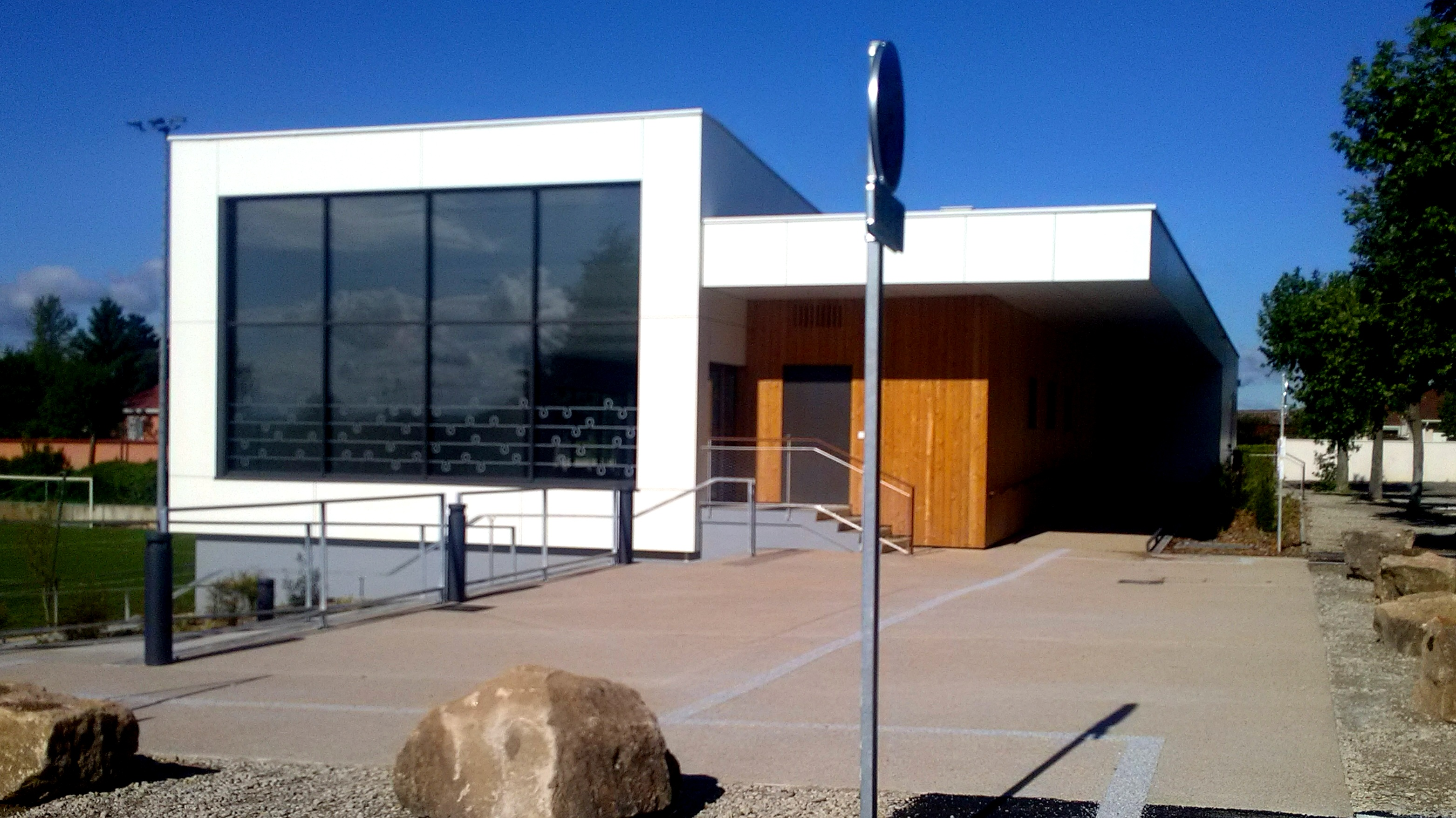 Pôle culturèl